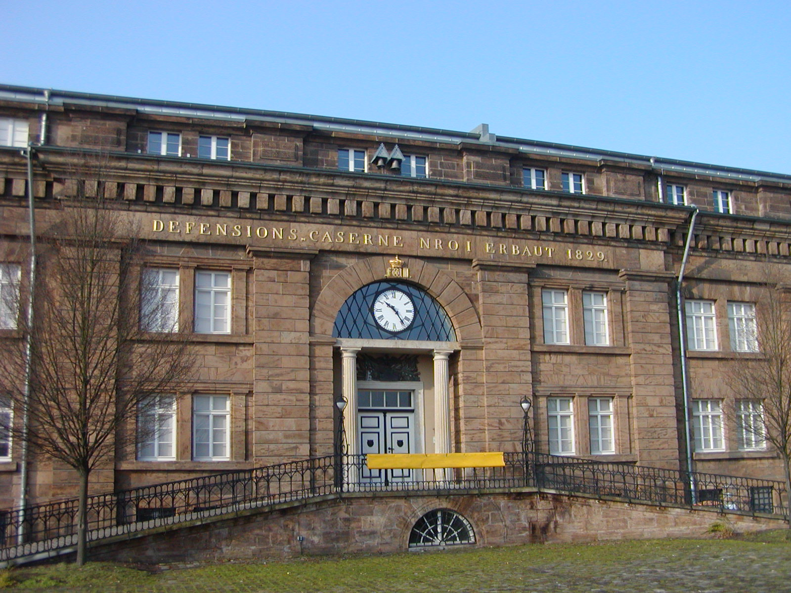 Das Hauptgebäude des Preußenmuseums in Minden, Nordrhein-Westfalen. Das heute als Museum genutzte Gebäude am Simeonsplatz war einst die Defensionskaserne und war Teil der Festung Minden. Die Inschrift über dem Portal lautet: DEFENSIONS-CASERNE NROI ERBAUT 1829